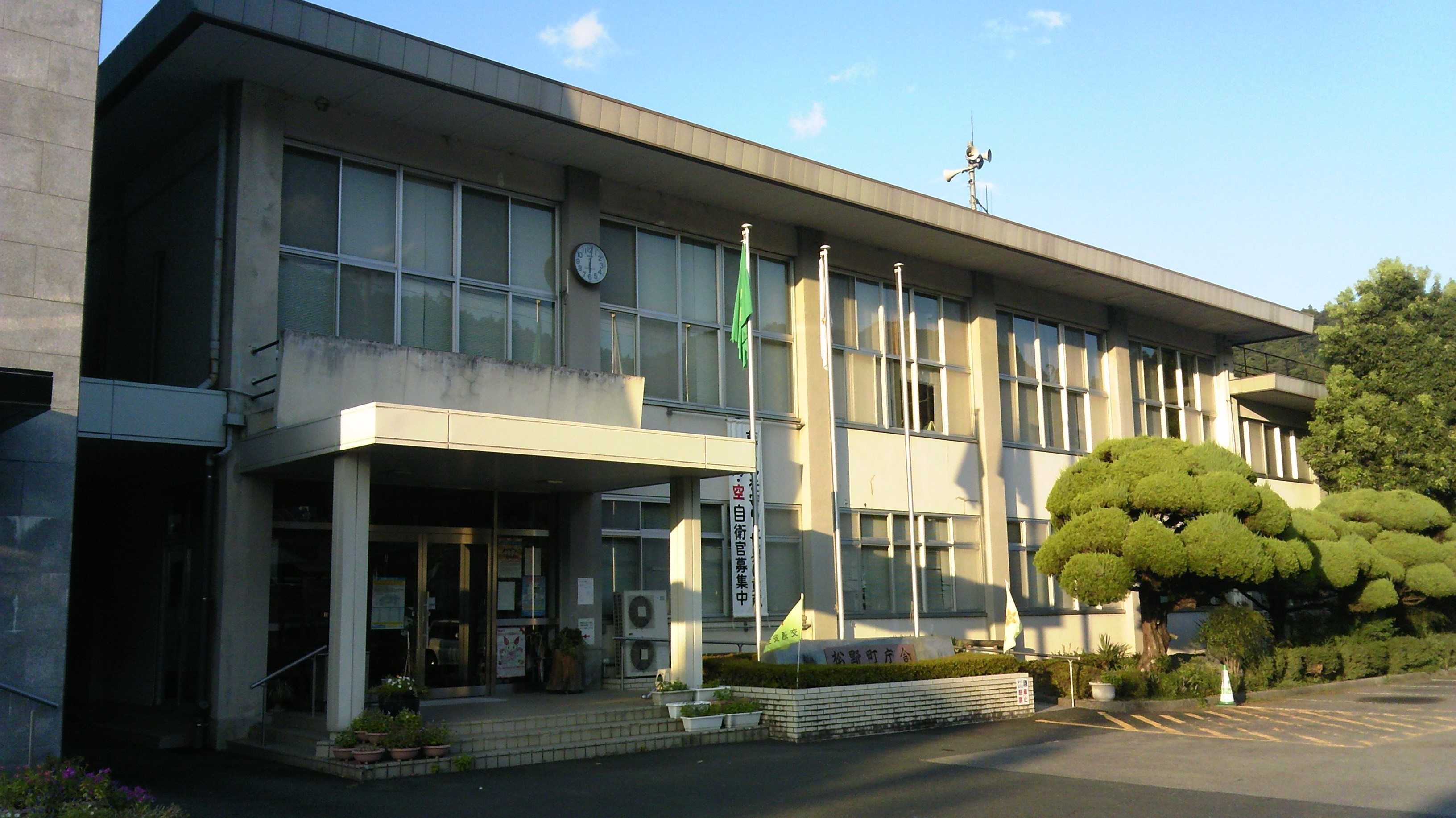 愛媛県北宇和郡松野町役場